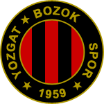 Logo von Yozgatspor